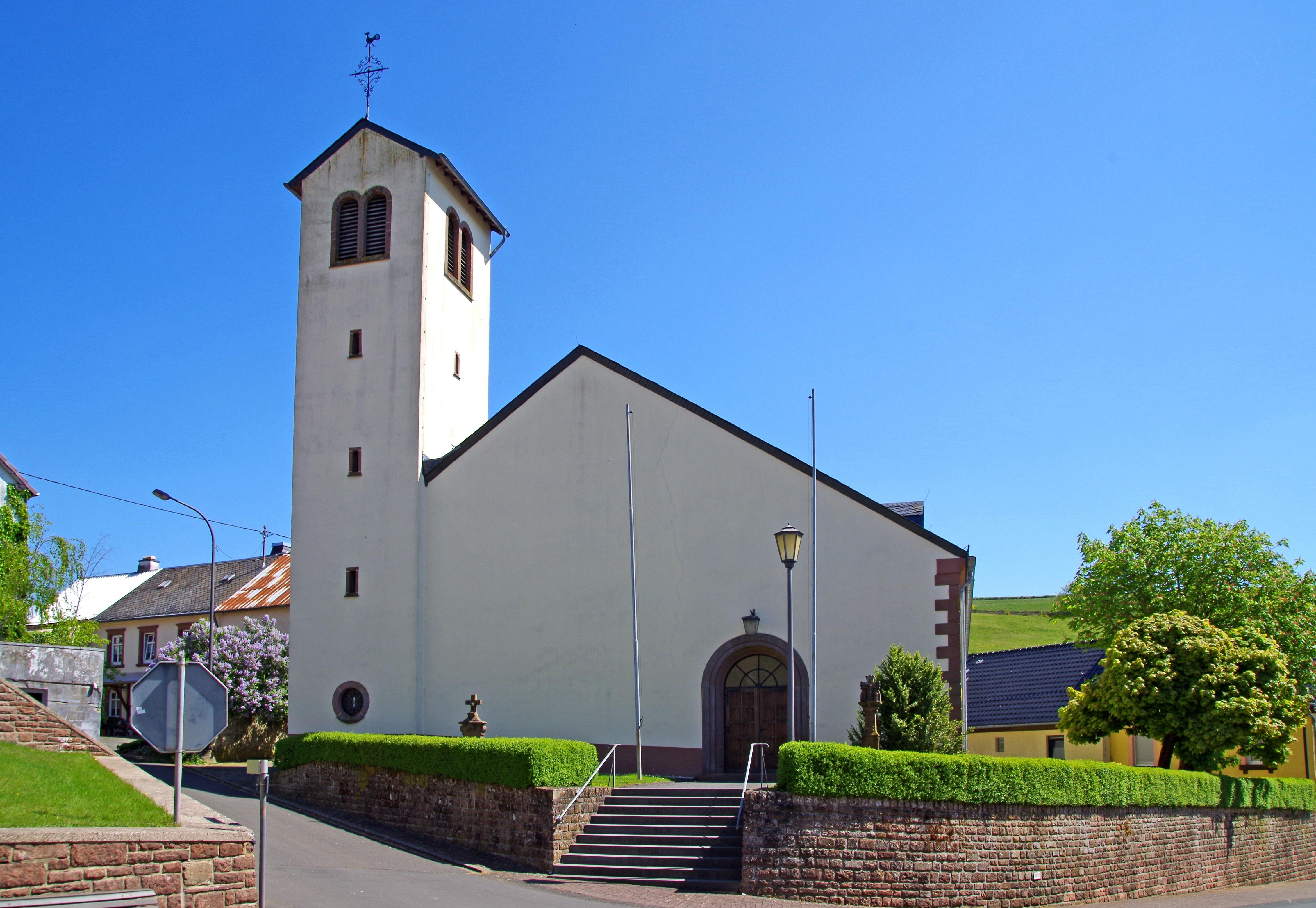 St. Margaretha (Burbach), Westseite mit Kirchturm und Portal